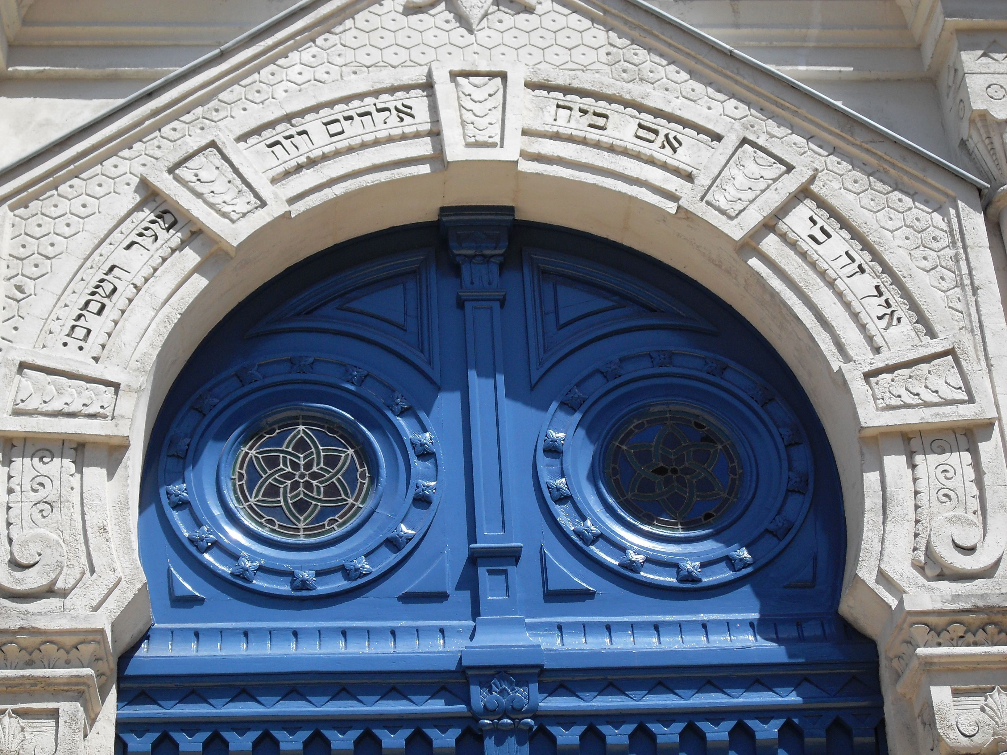 Synagogue de Reims, style néo-mauresque, inaugurée en 1879, œuvre de l’architecte Ernest Brunette - Au-dessus du portail est inscrit en hébreu le verset biblique Genèse 28:17 : "Ce [lieu] n'est autre que la maison de D.ieu, Et c'est la porte du ciel."